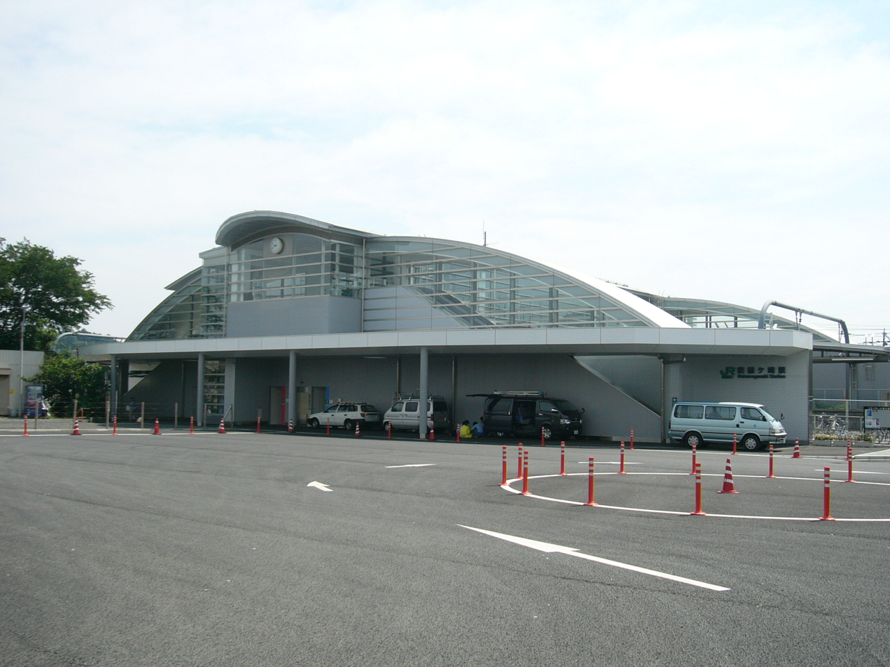 Hakonegasaki Station (West Exit)